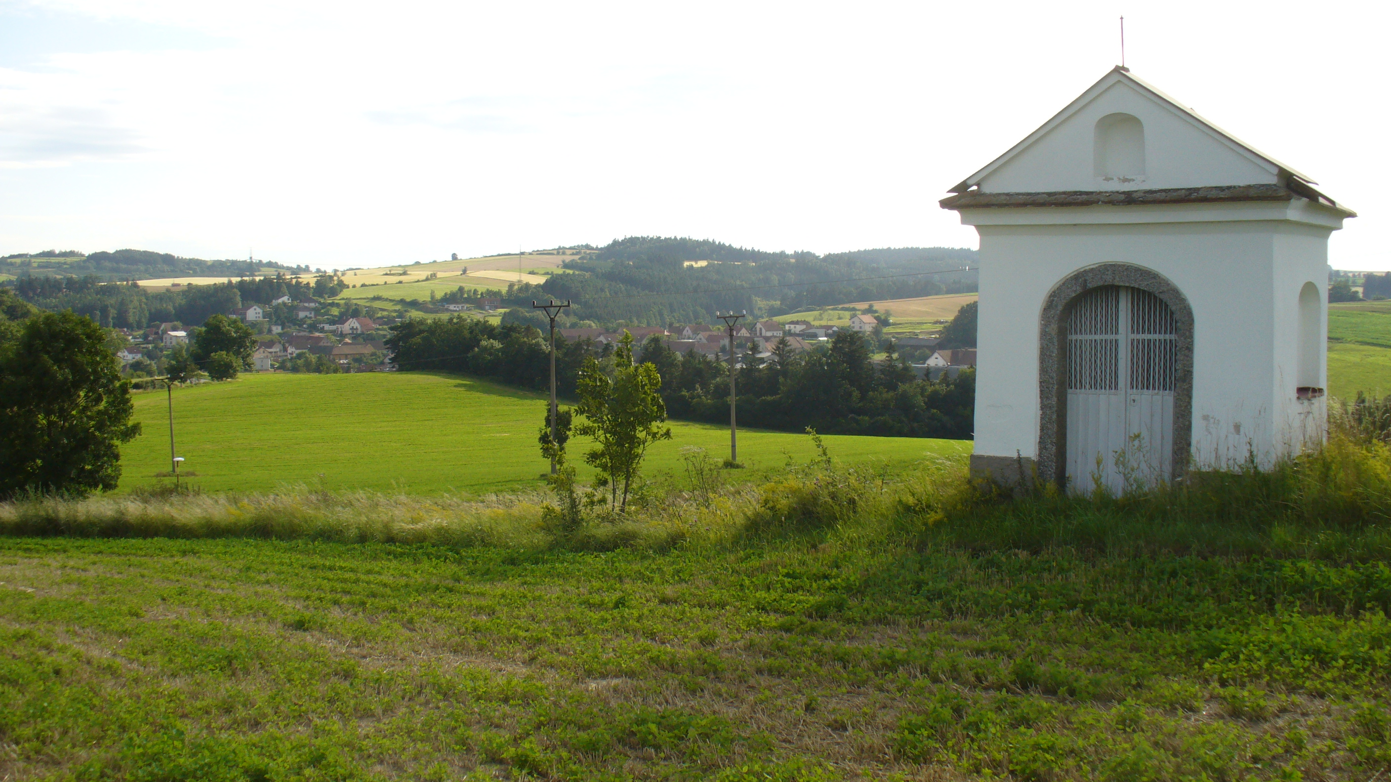 Kaplička u cesty do Mostiště